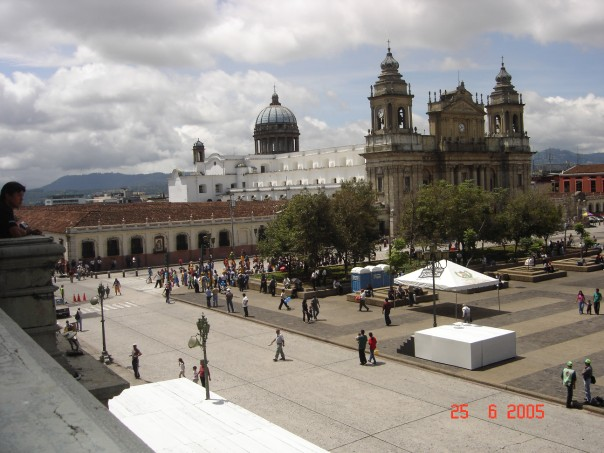 Vista de la Catedral Metropolitana en Ciudad de Guatemala desde el balcón presidencial de la Casa de la Cultura.